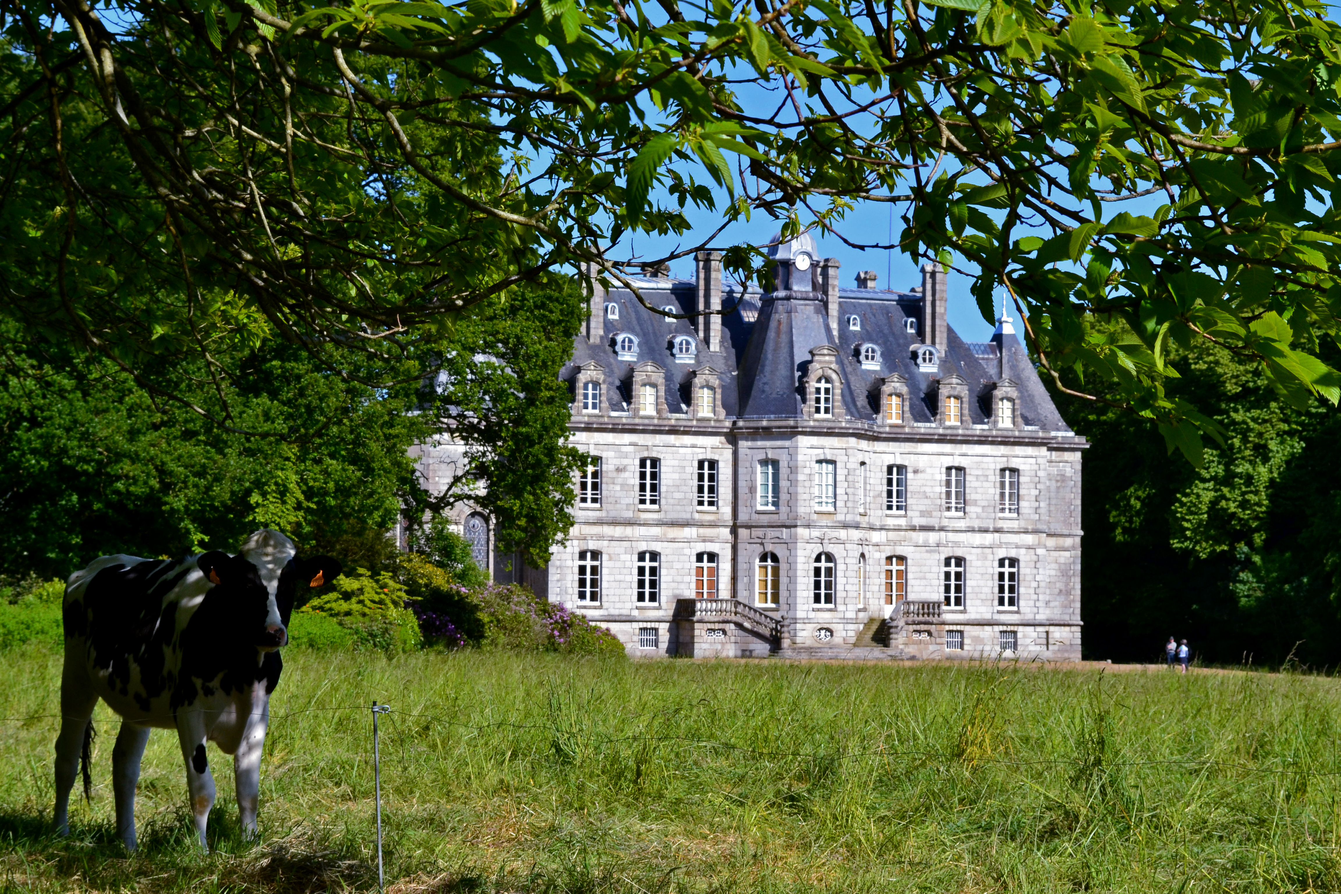 Château de Kernevez et son parc à Saint-Pol-de-Léon (Finistère).